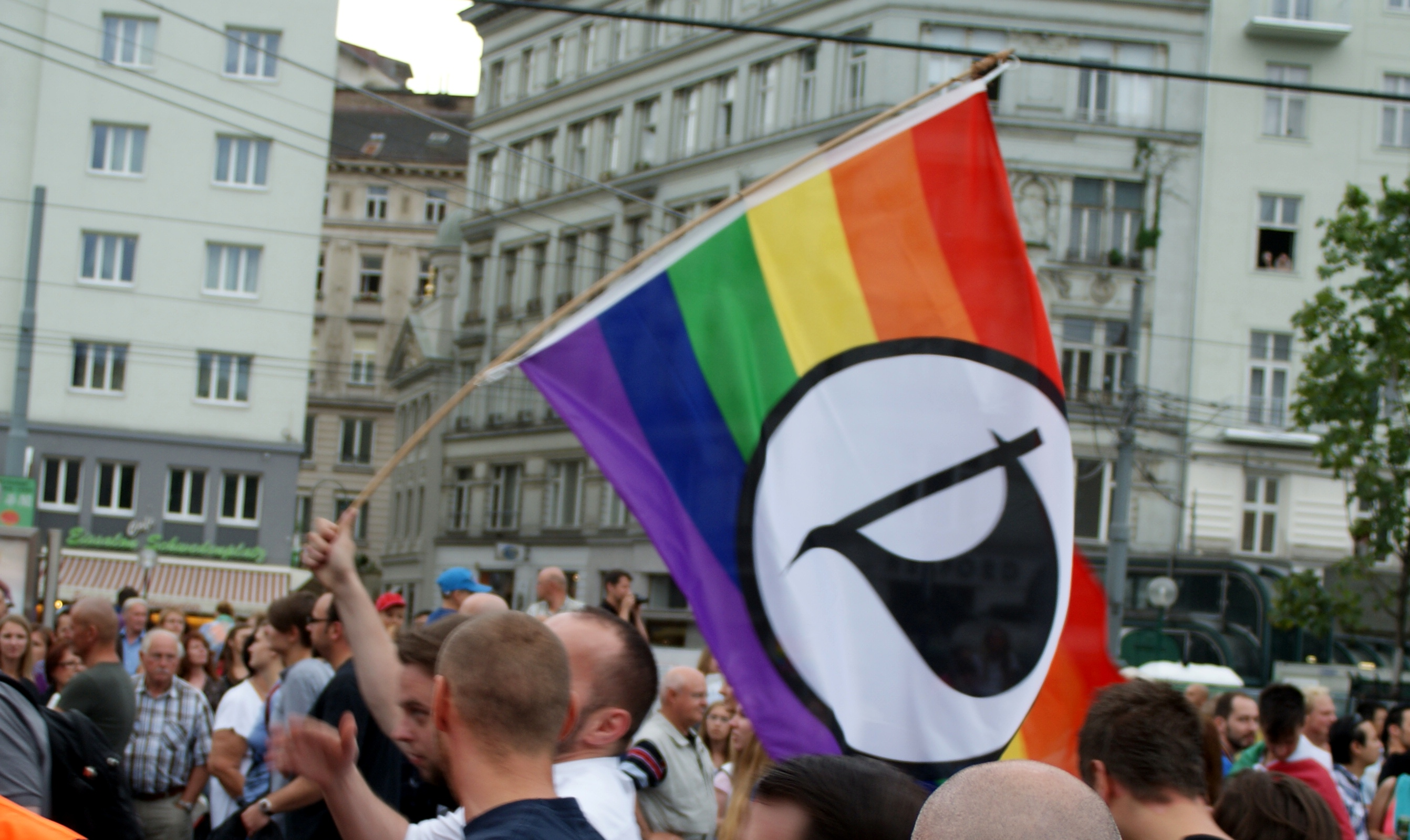 Piratenpartei bei der Regenbogenparade Wien